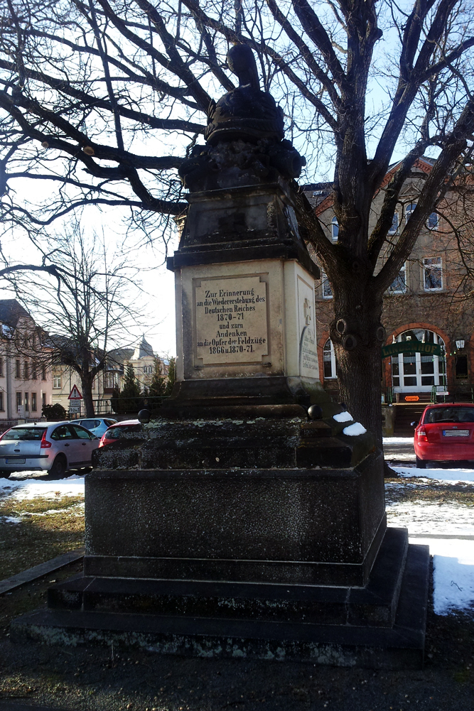 Radeberg, Denkmal Deutsches Reich